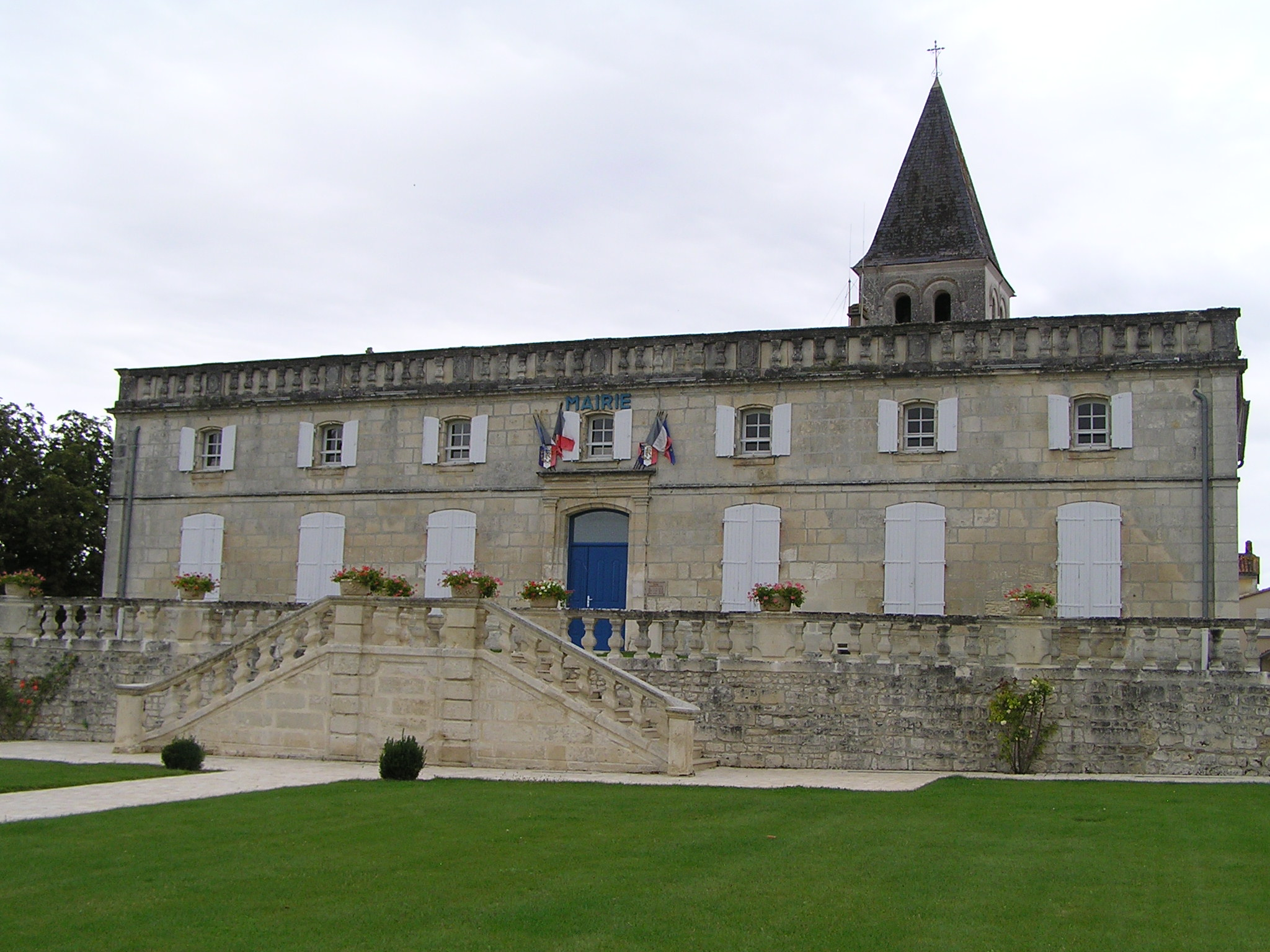 mairie de Sireuil (Charente)